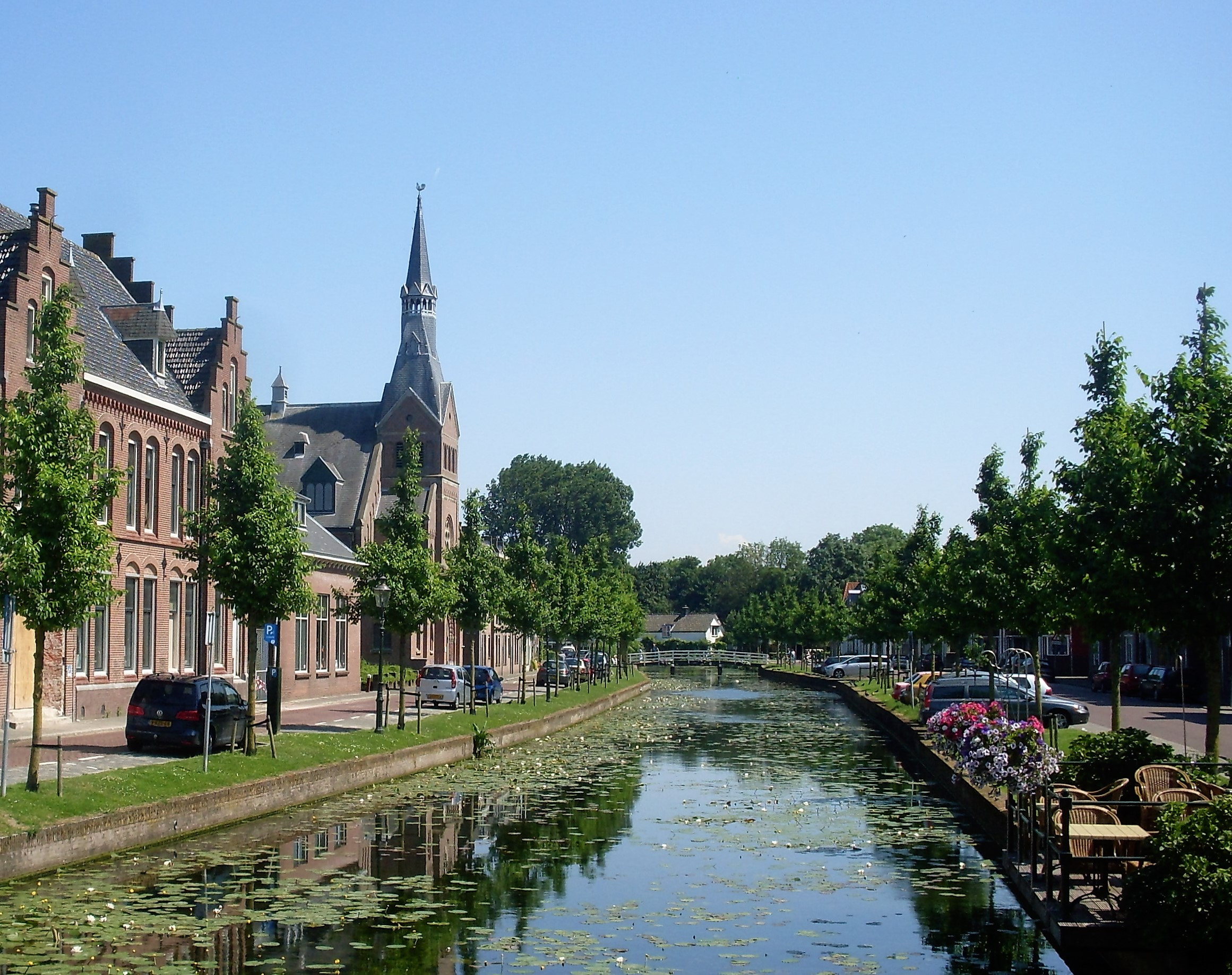 Langs de Vecht